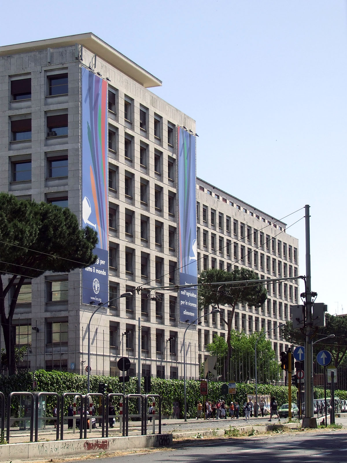 Sede della FAO, Organizzazione per l'Alimentazione e l'Agricoltura delle Nazioni Unite, a Roma, in Viale Avntino.